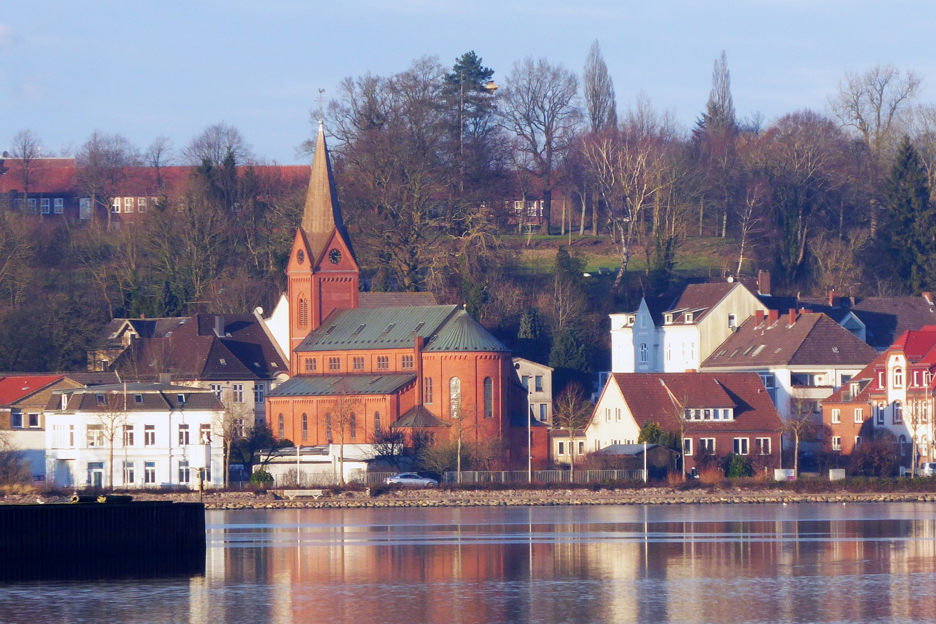 St. Ansgar Kirche in Schleswig - römisch-katholisch- Kirche aus der Perspektive von der Schlei, Schleswig-Holstein - Foto Wolfgang Pehlemann P1290344 (nicht zu verwechseln mit der dänischen Ansgargemeinde, die die Kirche im Ansgarhuset nutzt.